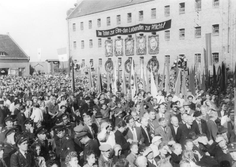 Lichtenburg, Kundgebung der VVN ADN-ZB/ Illus - Rohrlapper Prettin (Sachsen-Anhalt, Krs. Torgau), September 1949 In dem ehemaligen Konzentrationslager und Zuchthaus Lichtenburg fand am Sonntag eine grosse Massengedächtniskundgebung der VVN statt an der über 25.000 Personen teilnahmen. Bild: Ein Ausschnitt während der Kundgebung auf dem Hofe der Lichtenburg. 3933-49